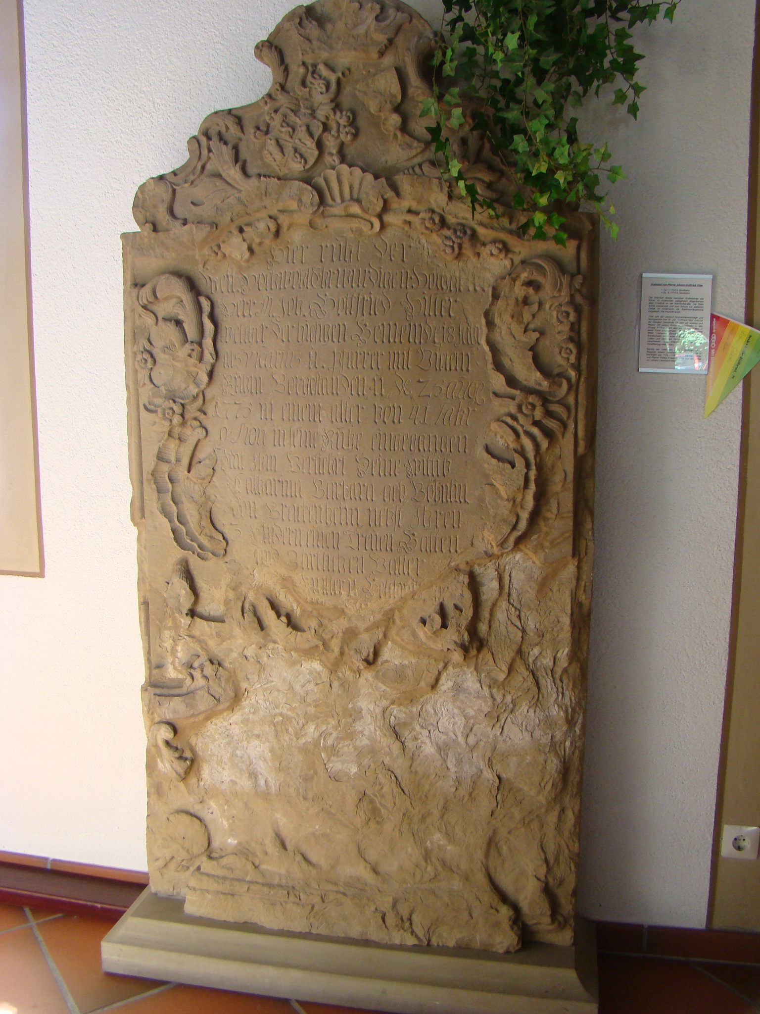 Hiller-Grabstein in der Nordheimer Bartholomäuskirche